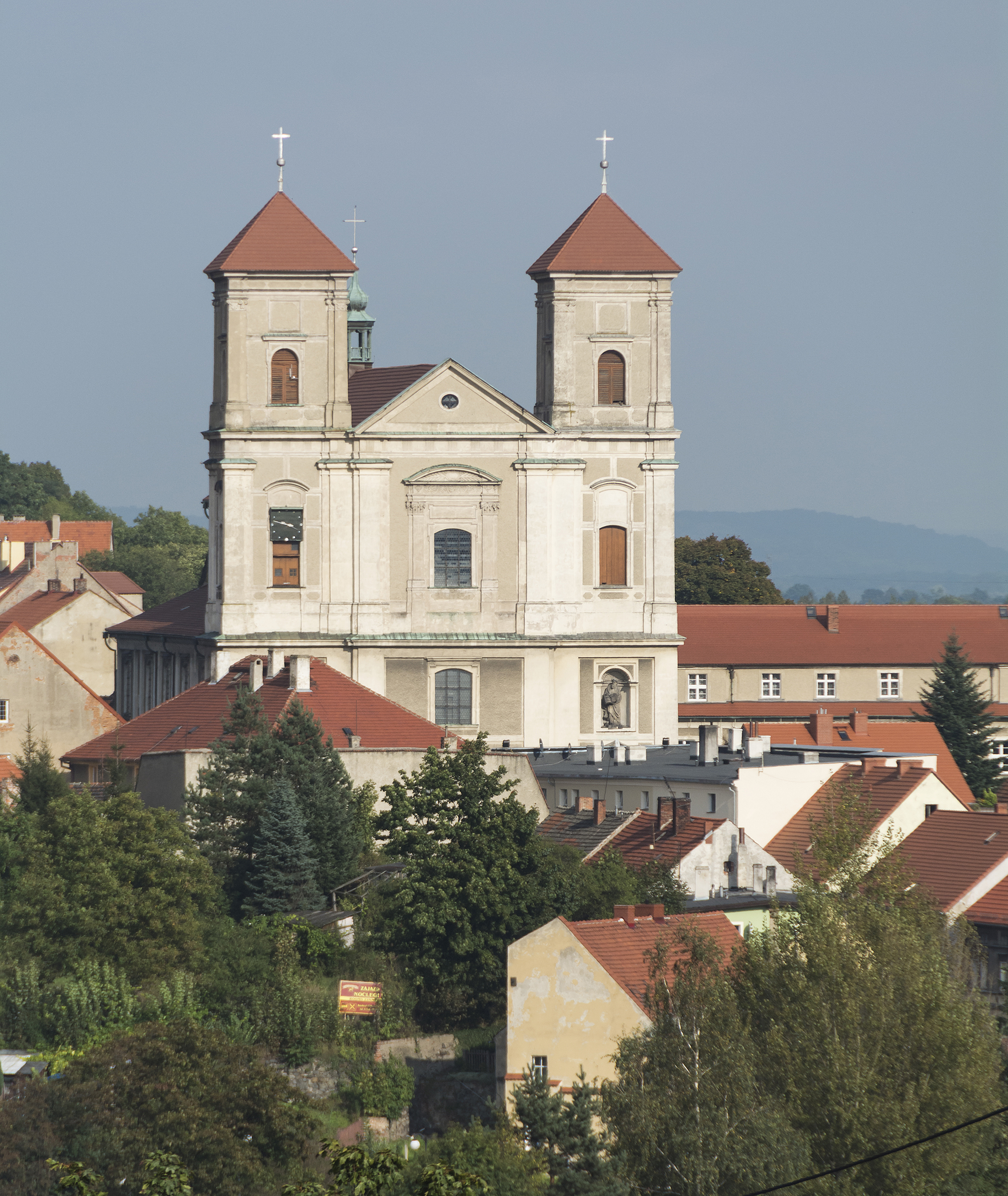 Bardo, miasto (obręb Starego Miasta), 1300